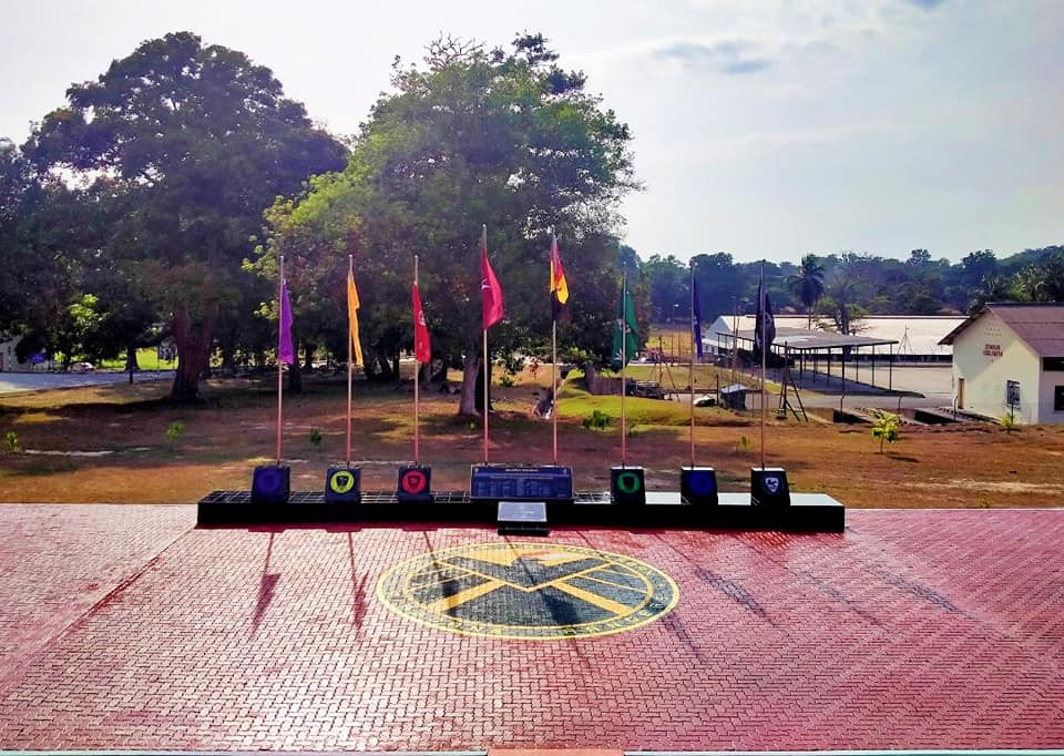 Terdapat sejarah penubuhan dan tempat berbaris